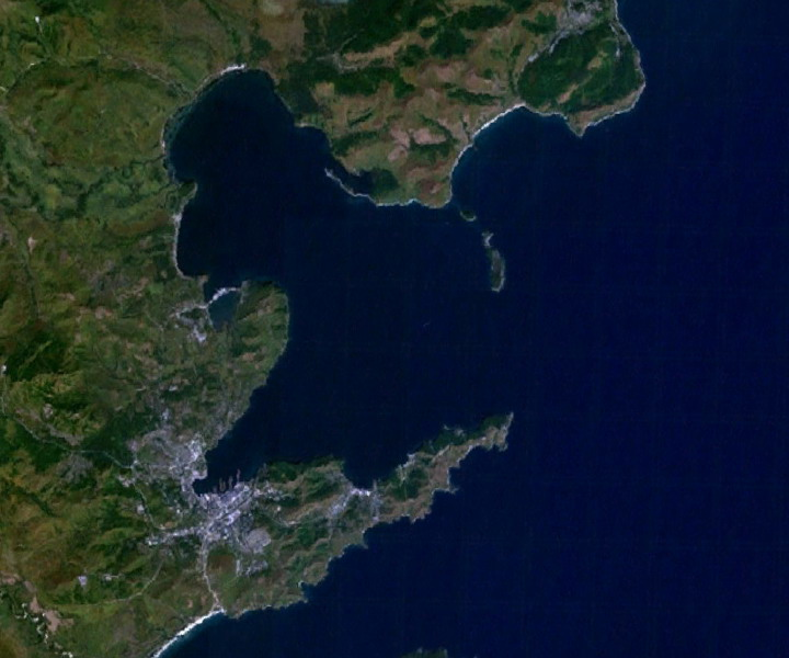 Славянский залив, острова Сидорова и Герасимова, посёлок Славянка, вид из космоса